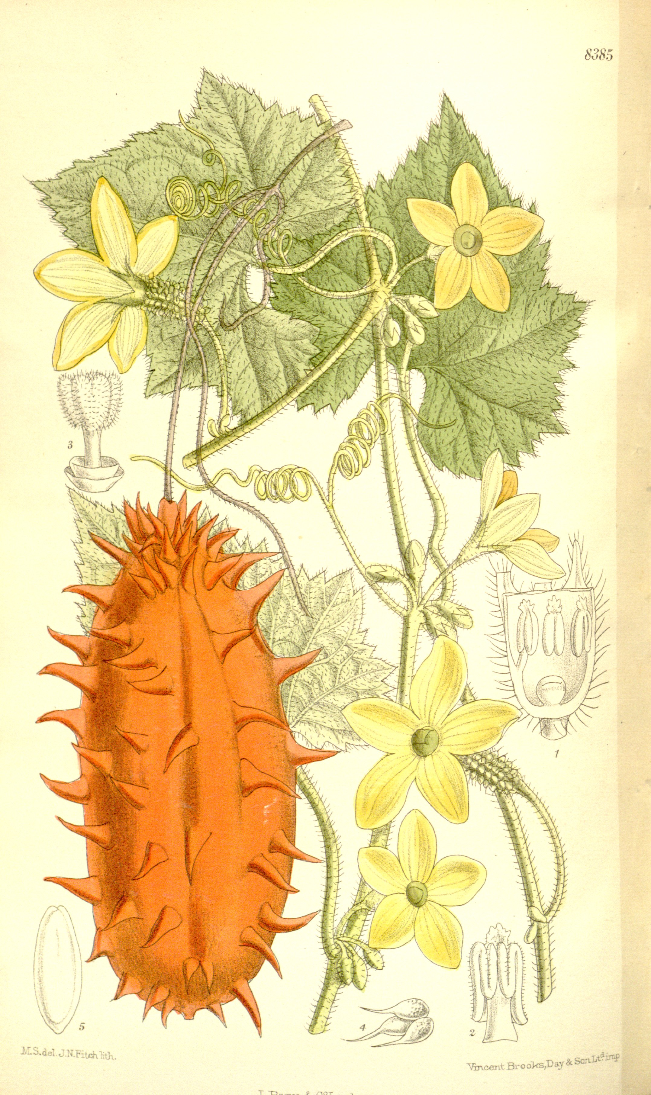 Cucumis metuliferus, Cucurbitaceae